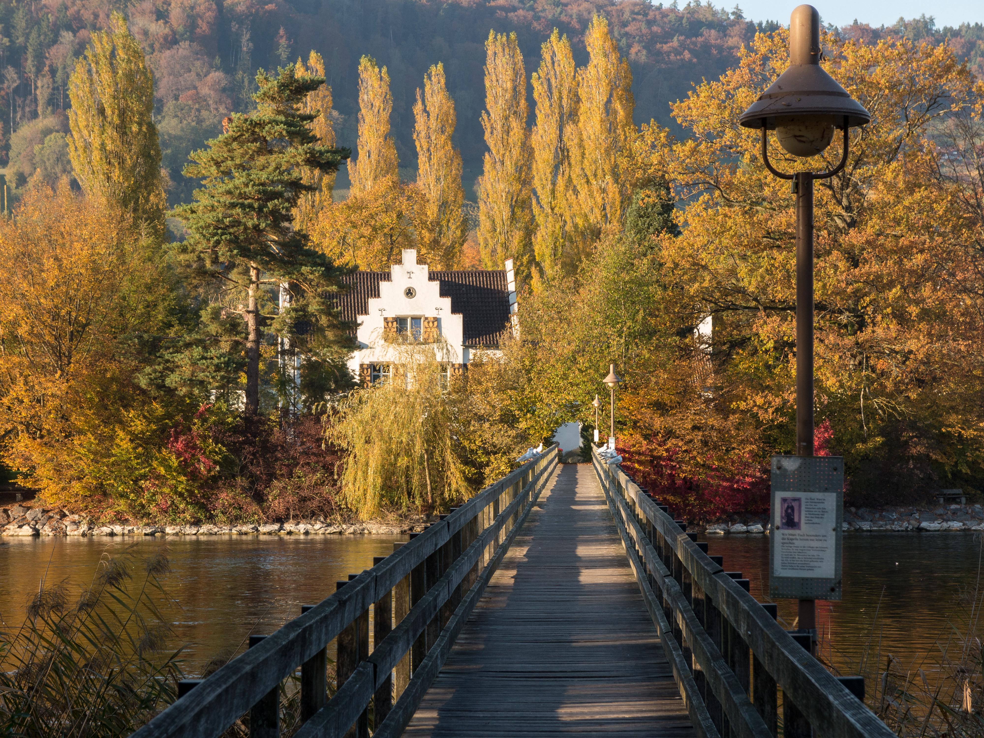 Insel Werd im Rhein, Okt. 2017